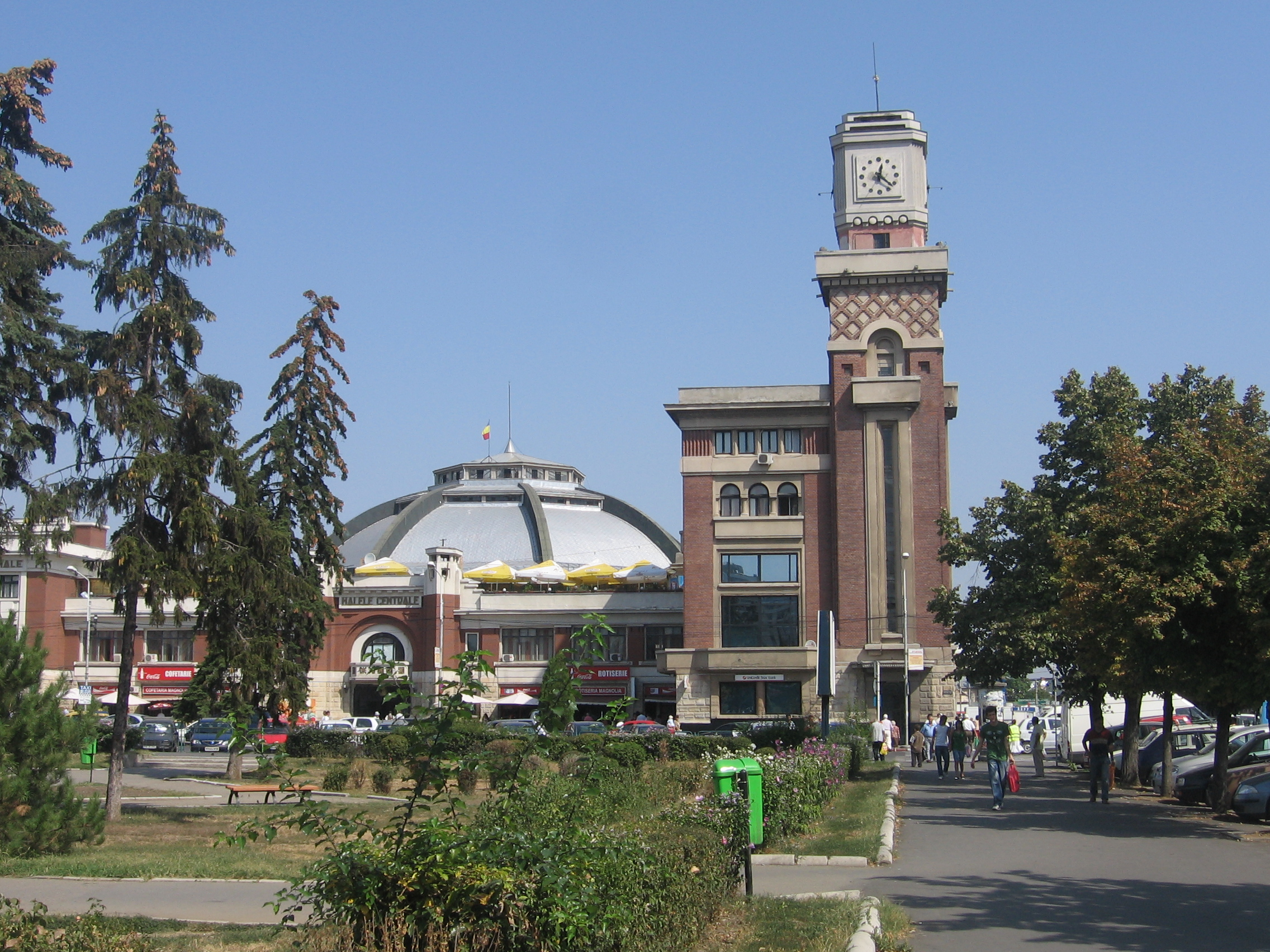 Halele Centrale & Parcul Foamea